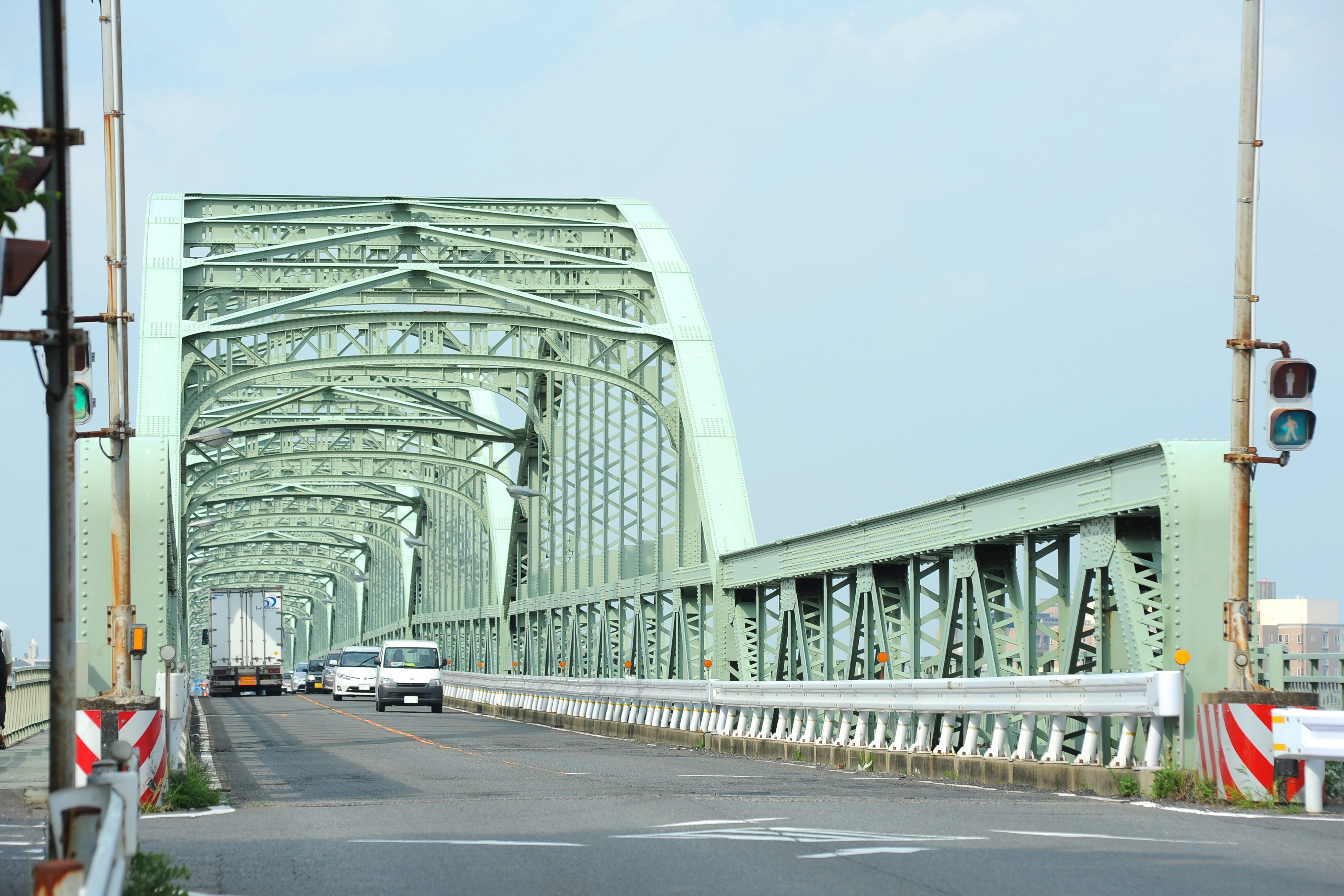 国道1号 尾張大橋 木曽川右岸（三重県側）より